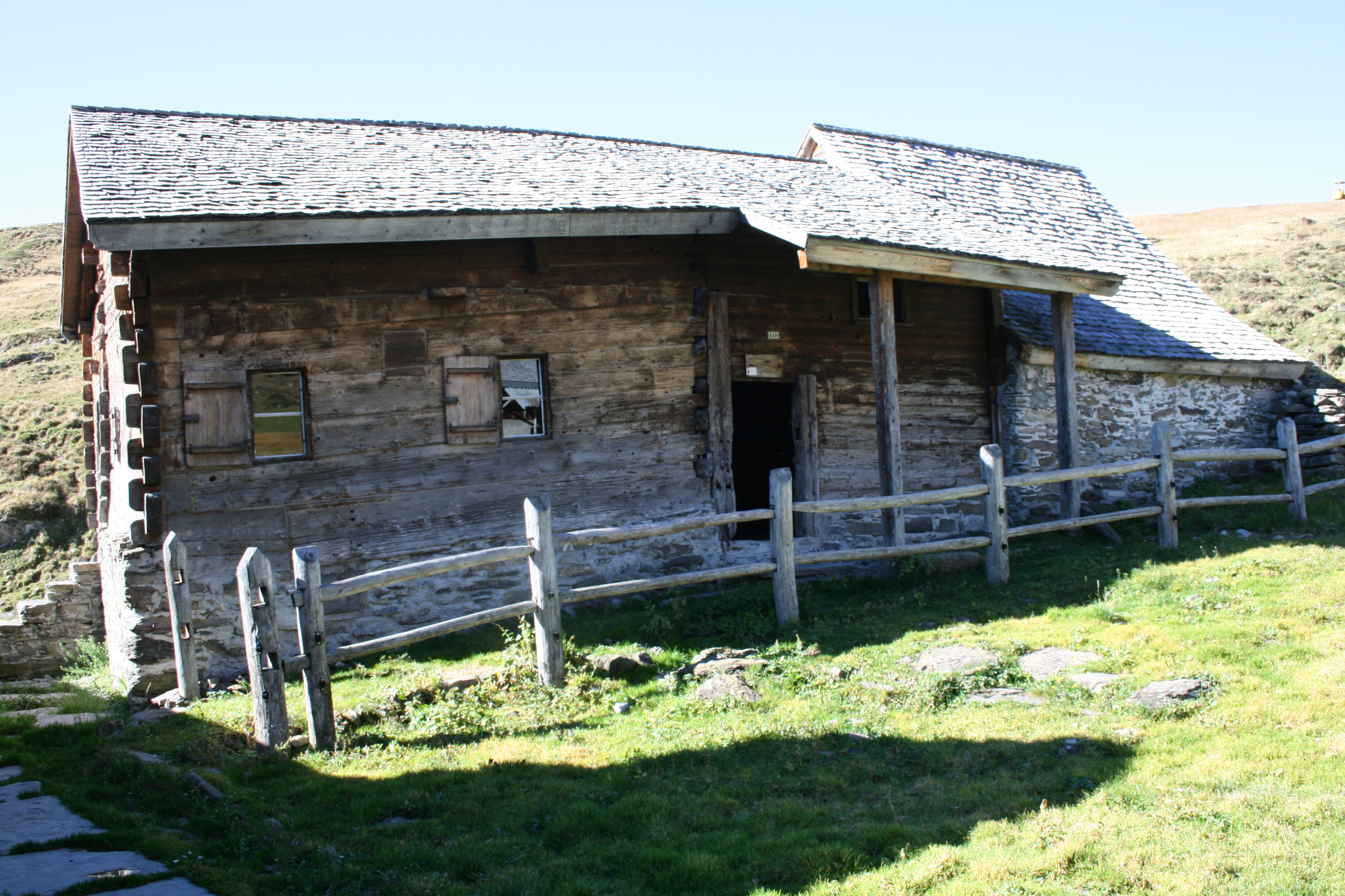 Walser Rathaus auf Palfries